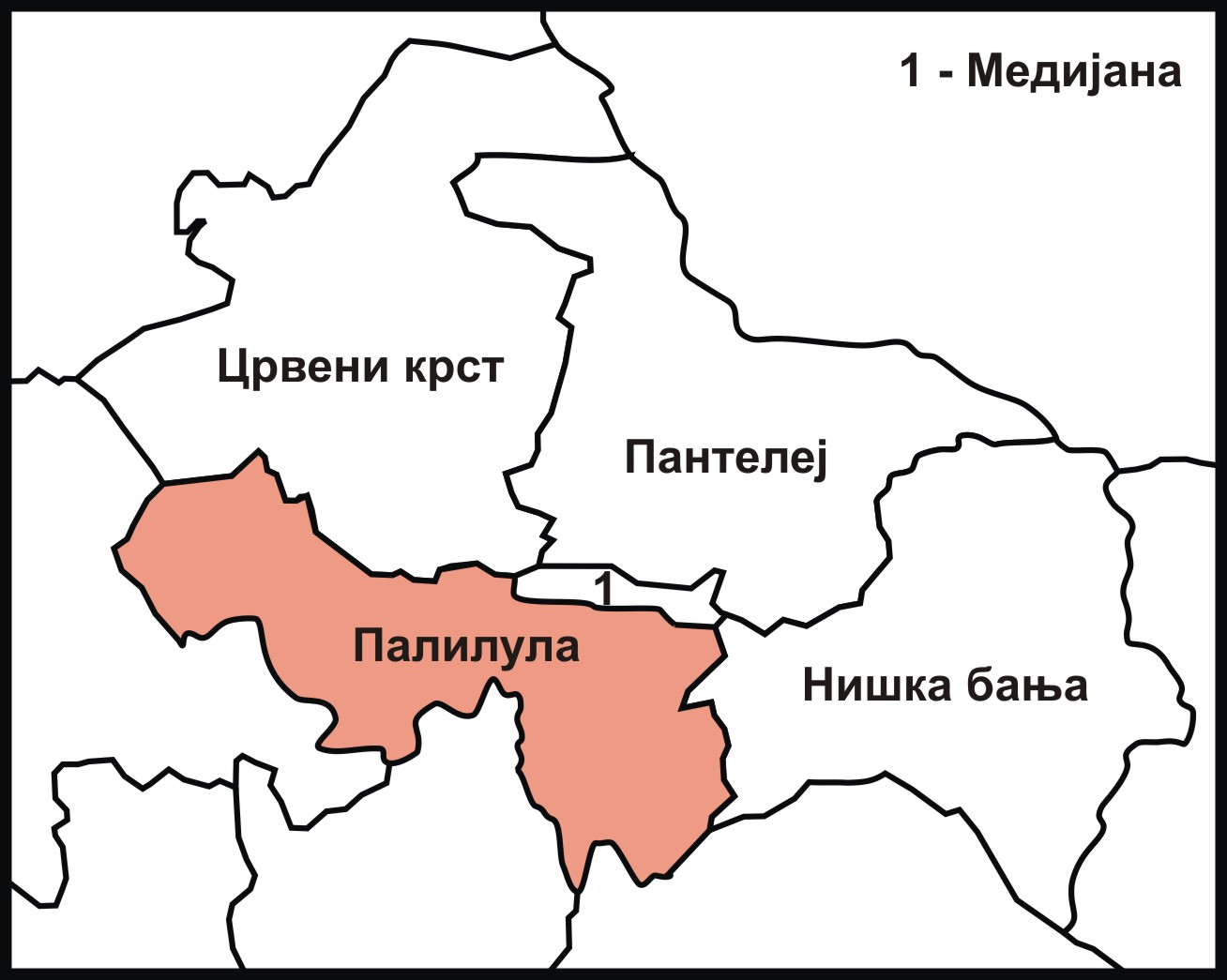 Gradska opština Palilula.